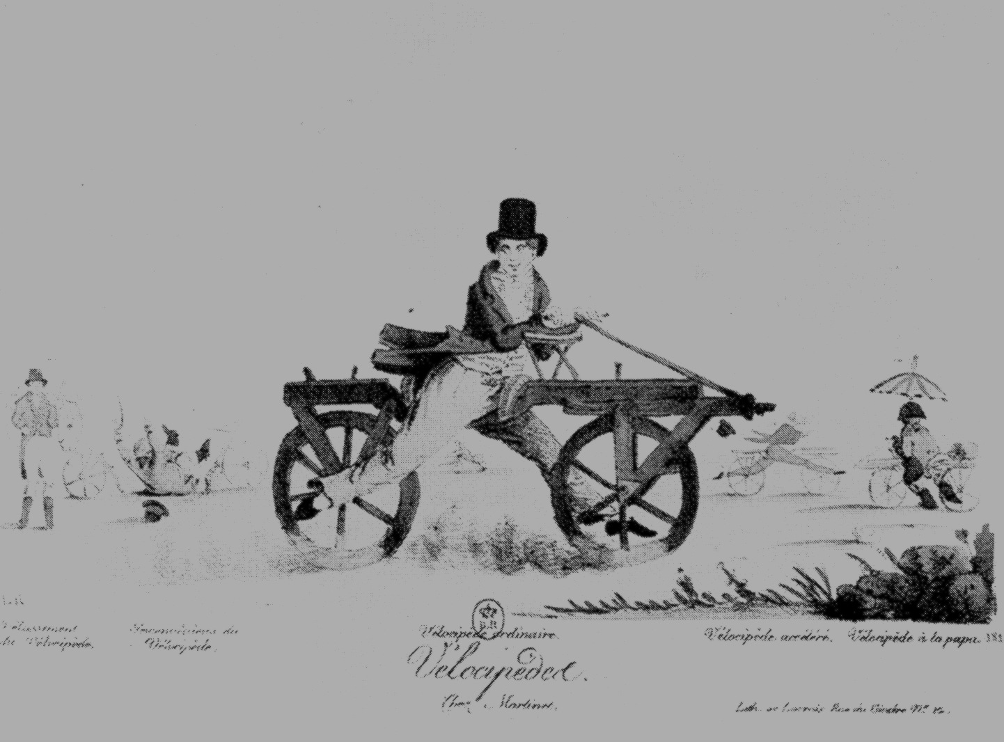 caricature des vélocipedes, Paris 1818